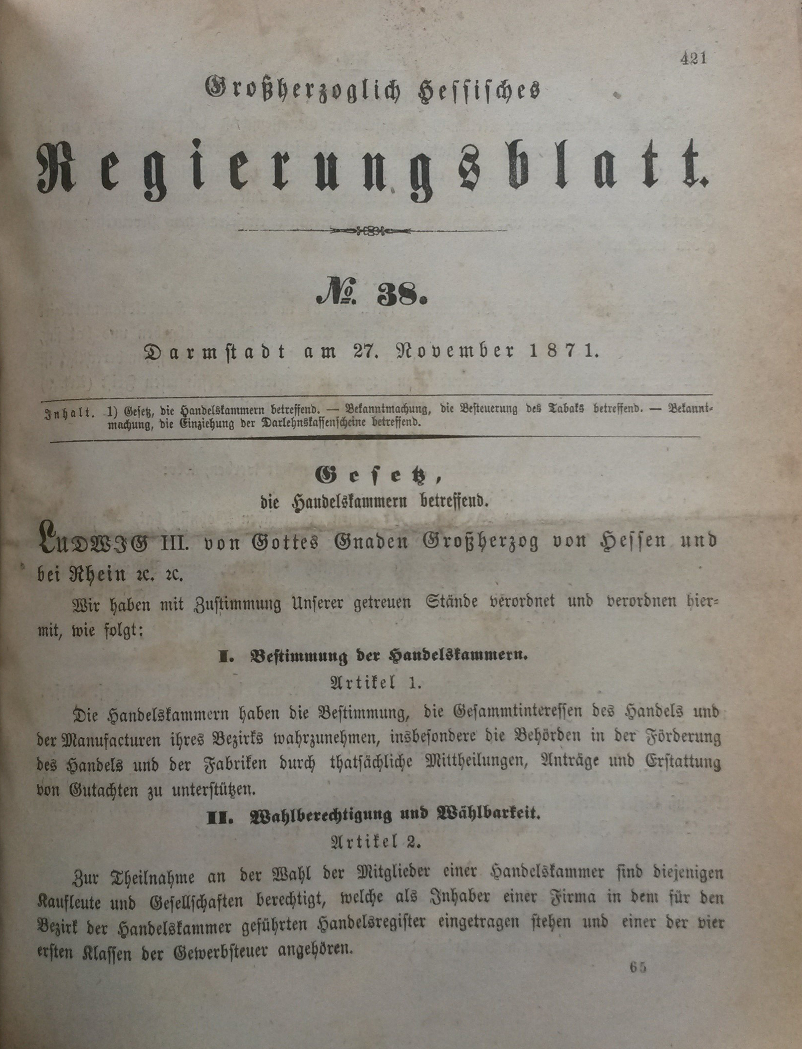 Großherzoglich Hessisches Regierungsblatt 1871, S. 421